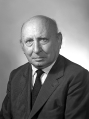 architetto, ingegnere, accademico e politico italiano